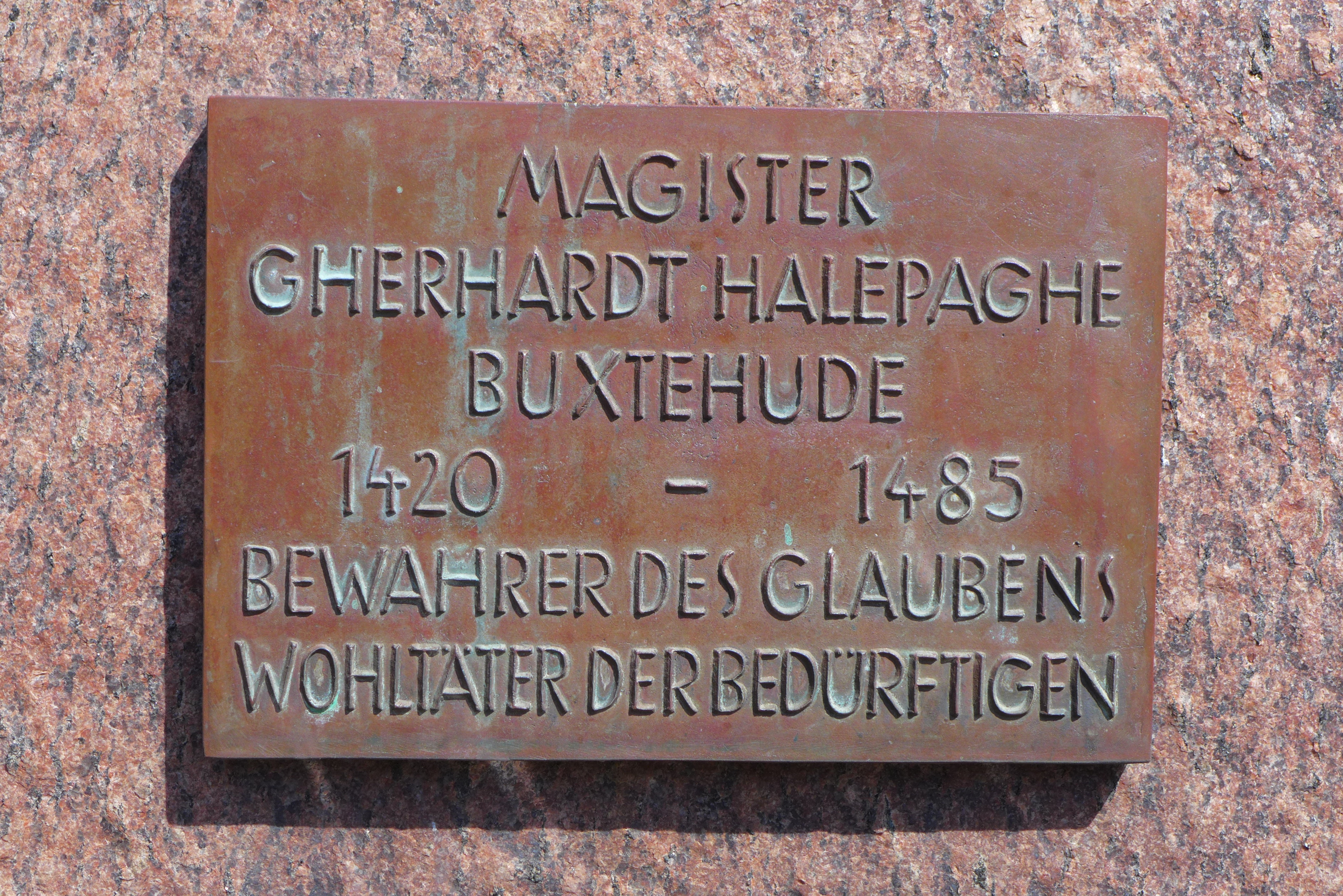 Halepaghen-Brunnen in Buxtehude, Inschrift